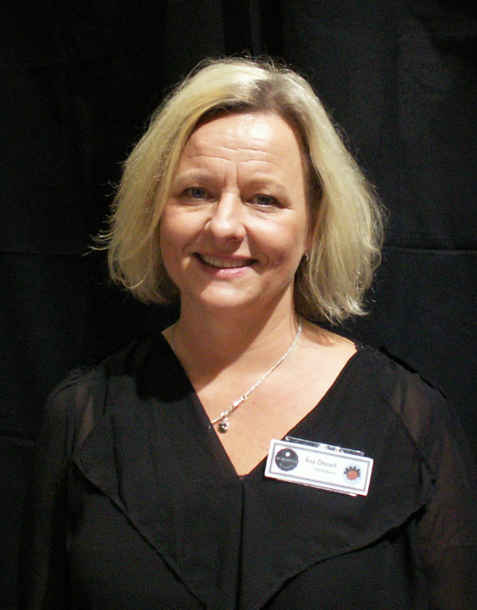 Åsa Öhnell på Bokmässan i Göteborg 2016.